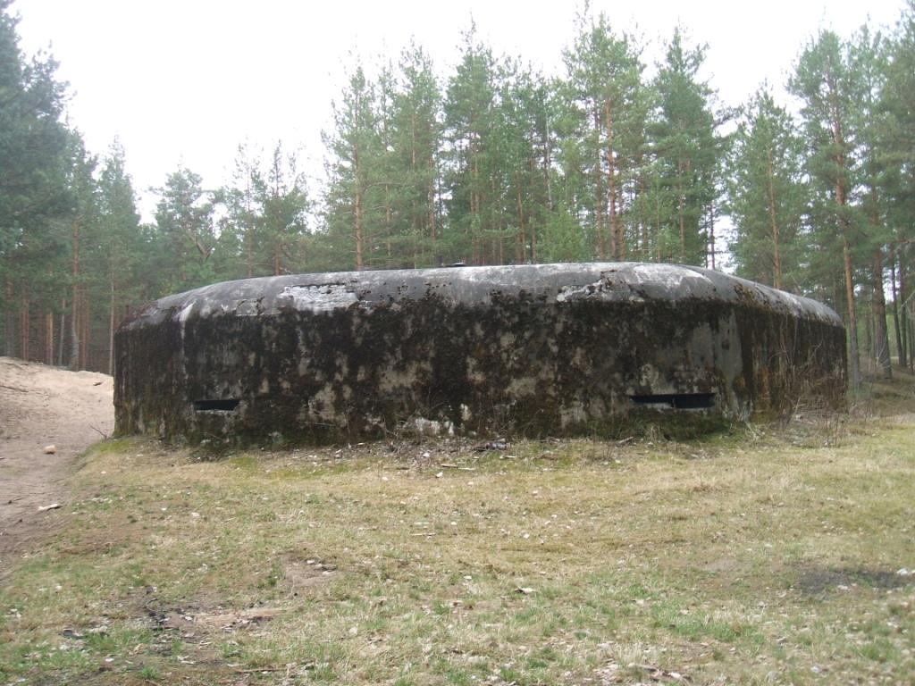 ДОТ у санатория "Детские Дюны" в г. Сестрорецке. Входил в систему бывшего КаУРа